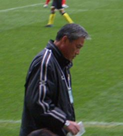 サッカー協会副会長